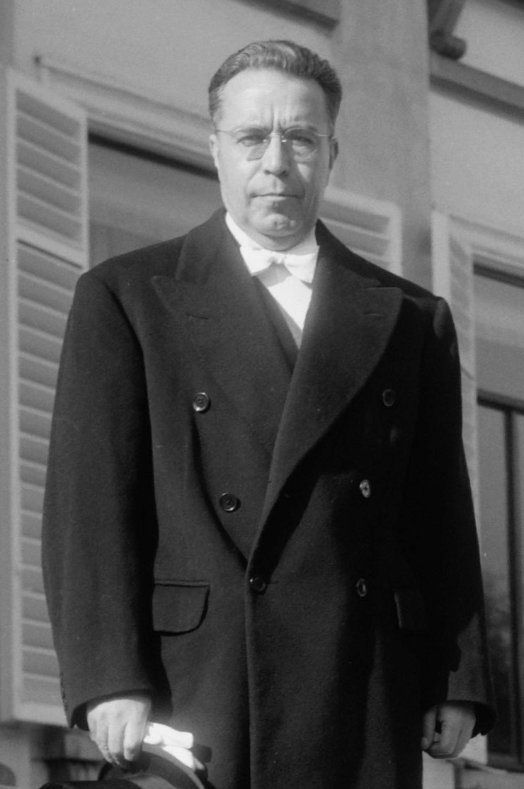 Ambassadeur van Bolivia Paz Estenssora biedt geloofsbrieven aan op Paleis Soestdijk